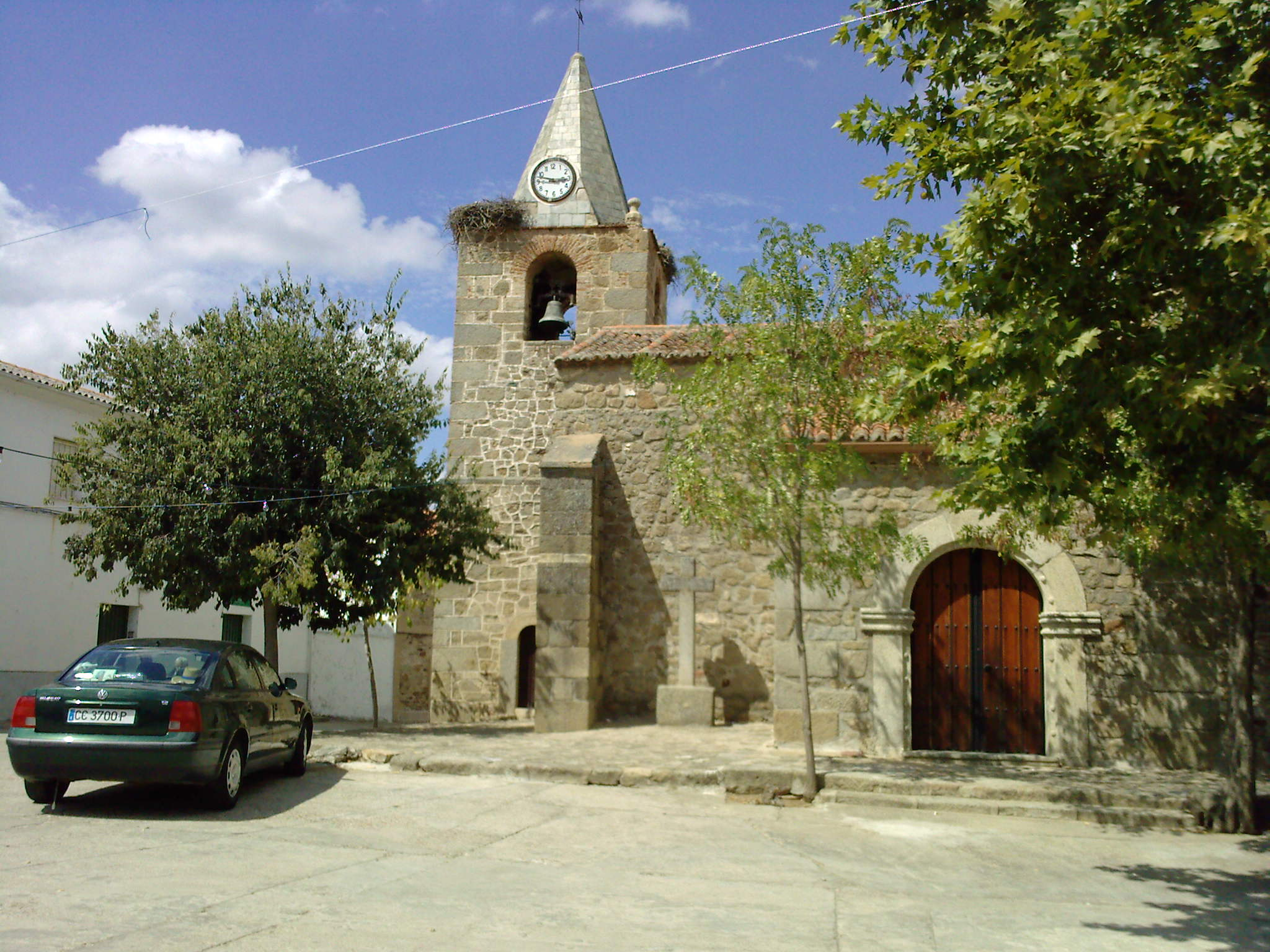 Iglesia en Conquista de la Sierra, provincia de Cáceres, España.